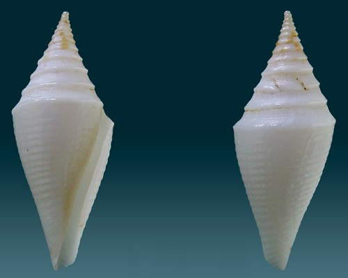 Conus beatrix (Tenorio. M.J., G.T. Poppe & S. Tagaro. 2007.) 23,7 mm Philiphines.